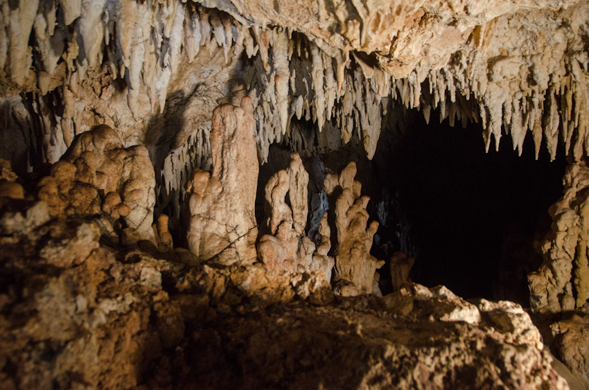 Parque Nacional El Choco, Cabarete.